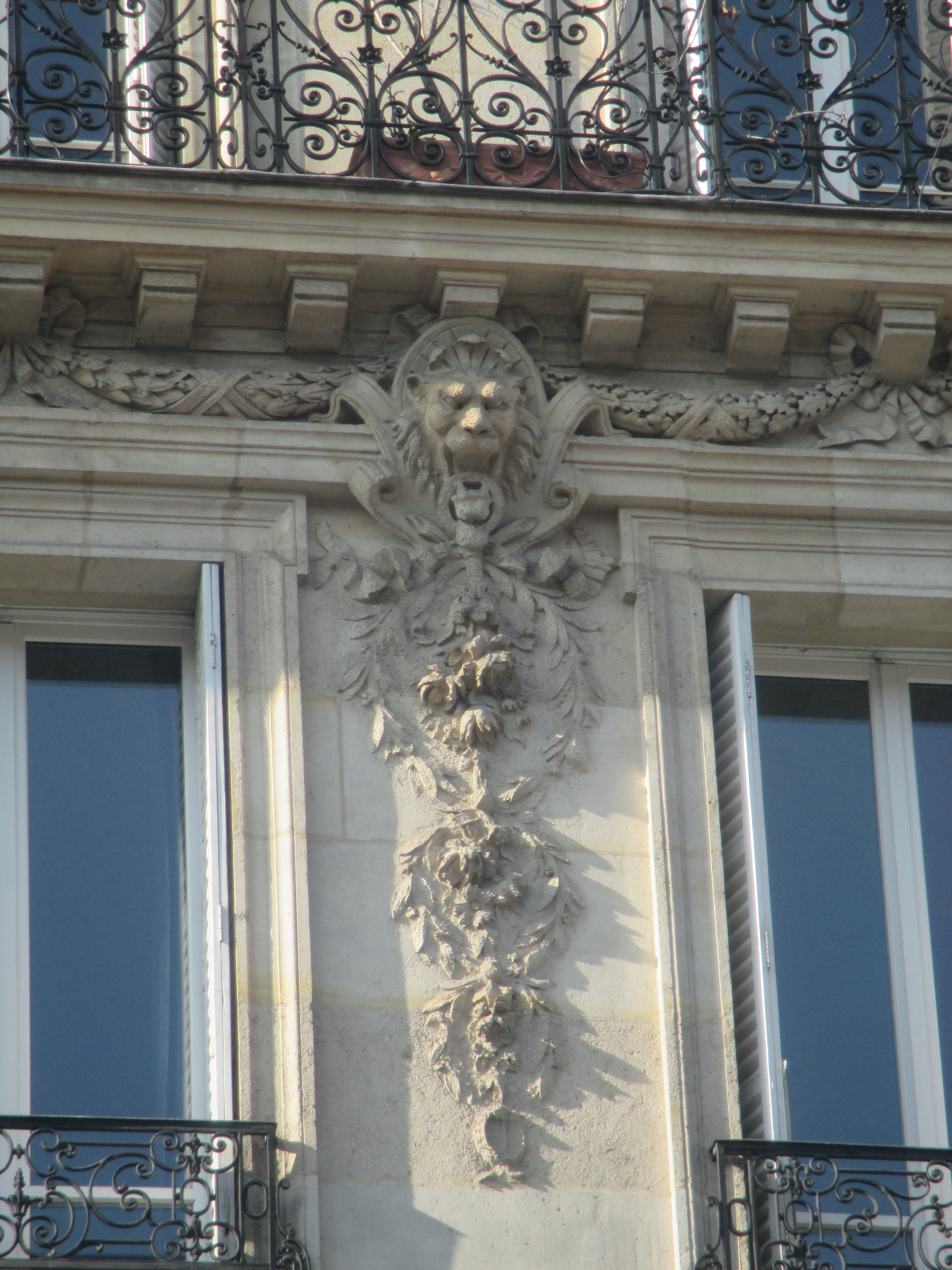 Façade du 8 avenue Victor Hugo (paris XVIe): détail.